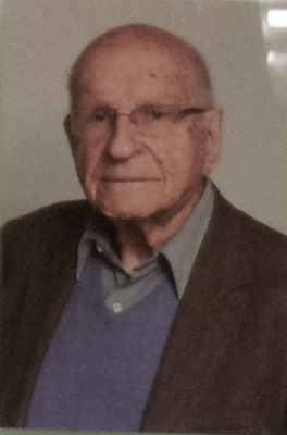 שלט יונה רוזנפלד בפתח בית הספר לעבודה סוציאלית בקמפוס האוניברסיטה העברית בהר הצופים